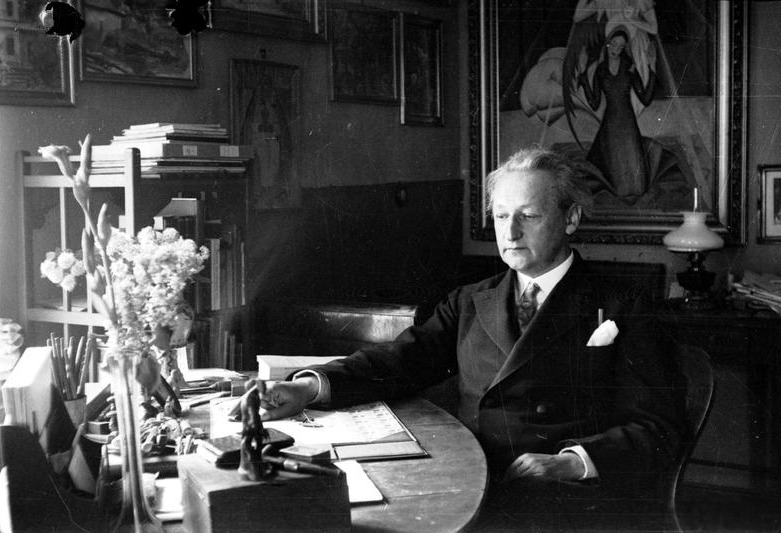 Emil Zegadłowicz (1888 - 1941) - poeta w swoim mieszkaniu; Gorzeń Górny, woj. krakowskie; zdjęcie ze zbioru: Jubileusz 25 lecia pracy pisarskiej Emila Zegadłowicza.